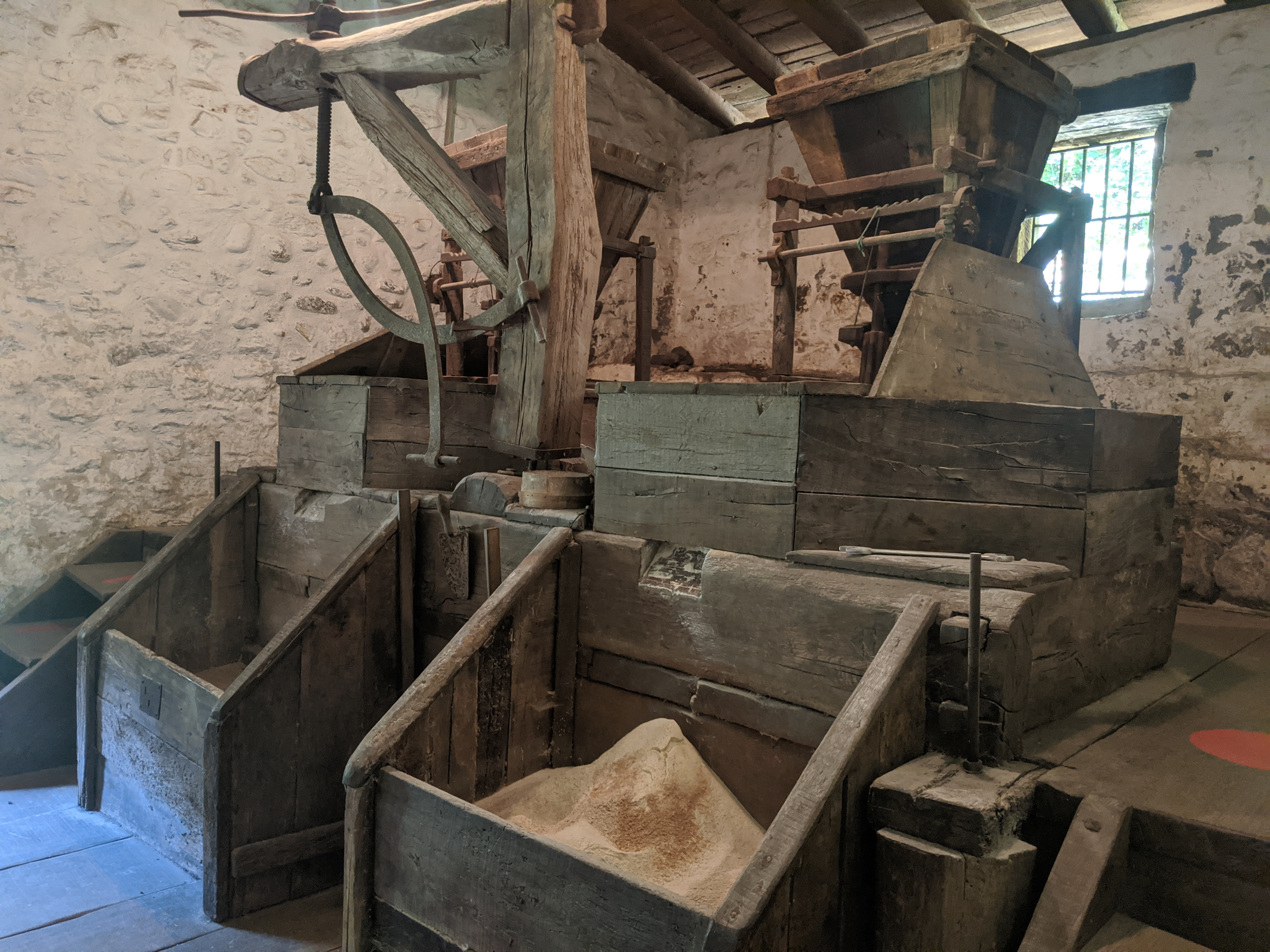 El Pobaleko burdinola Muskizko El Pobal auzoan dagoen burdinola da. Salazartarrek XVI. mendean eraiki zuten.